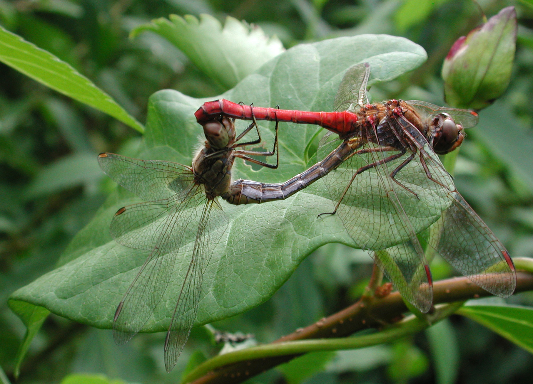 Sympetrum vulgatum, tandem, NSG Kirchwerder Wiesen, Elbmarsch bei Hamburg, Germany